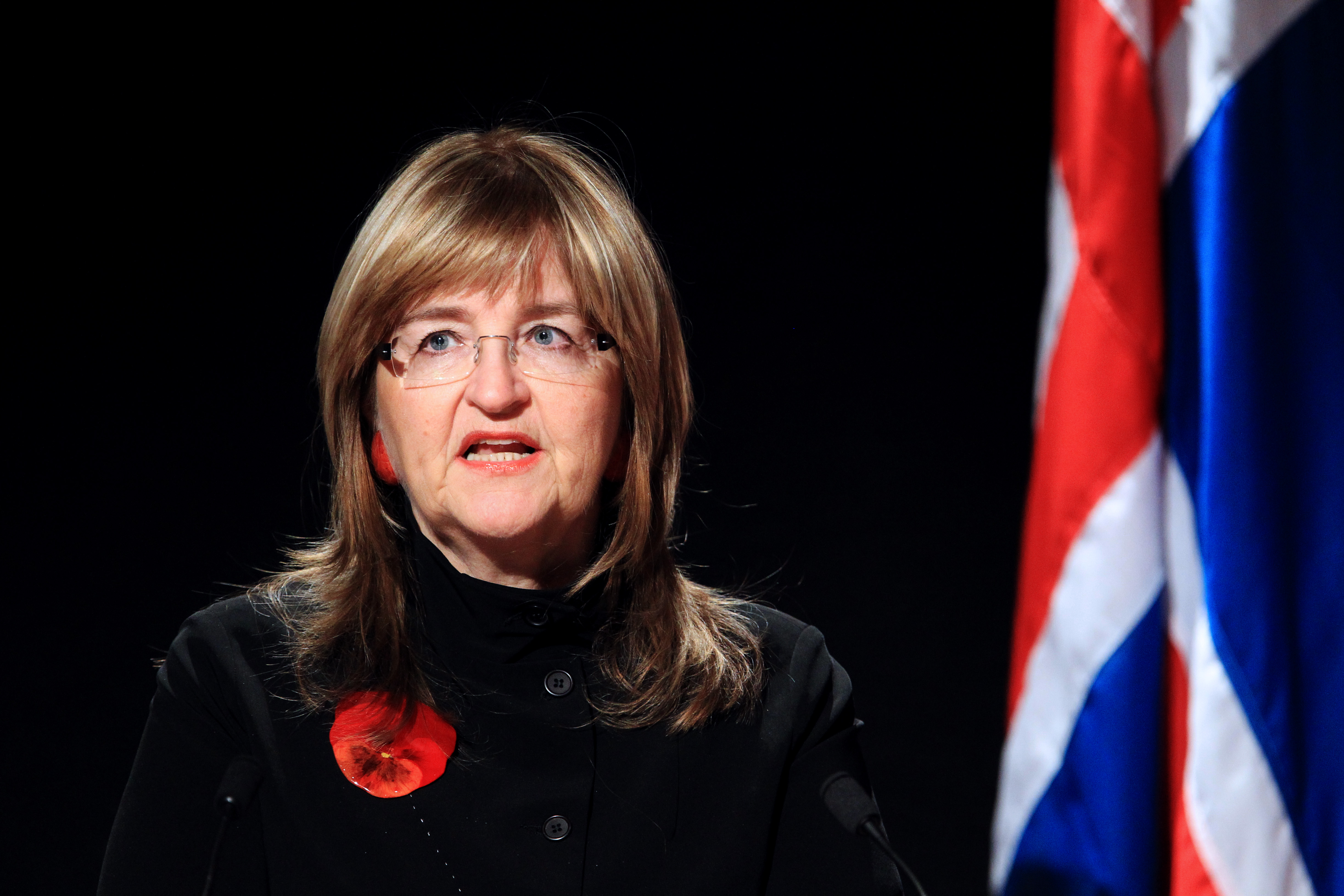 Ásta R. Jóhannesdóttir talman Althingi öppnar Nordiska rådets session i Reykjavik 2010